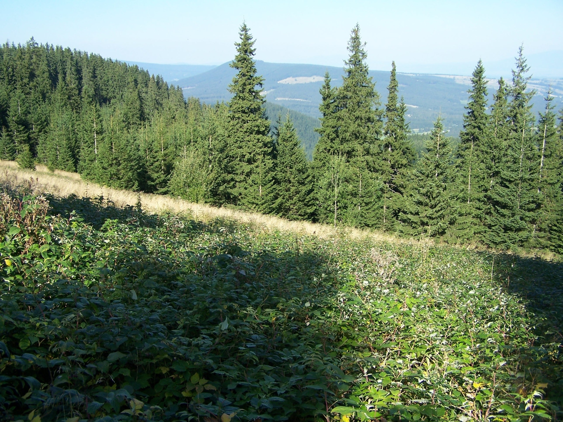 Polana Jaworzyna Miętusia